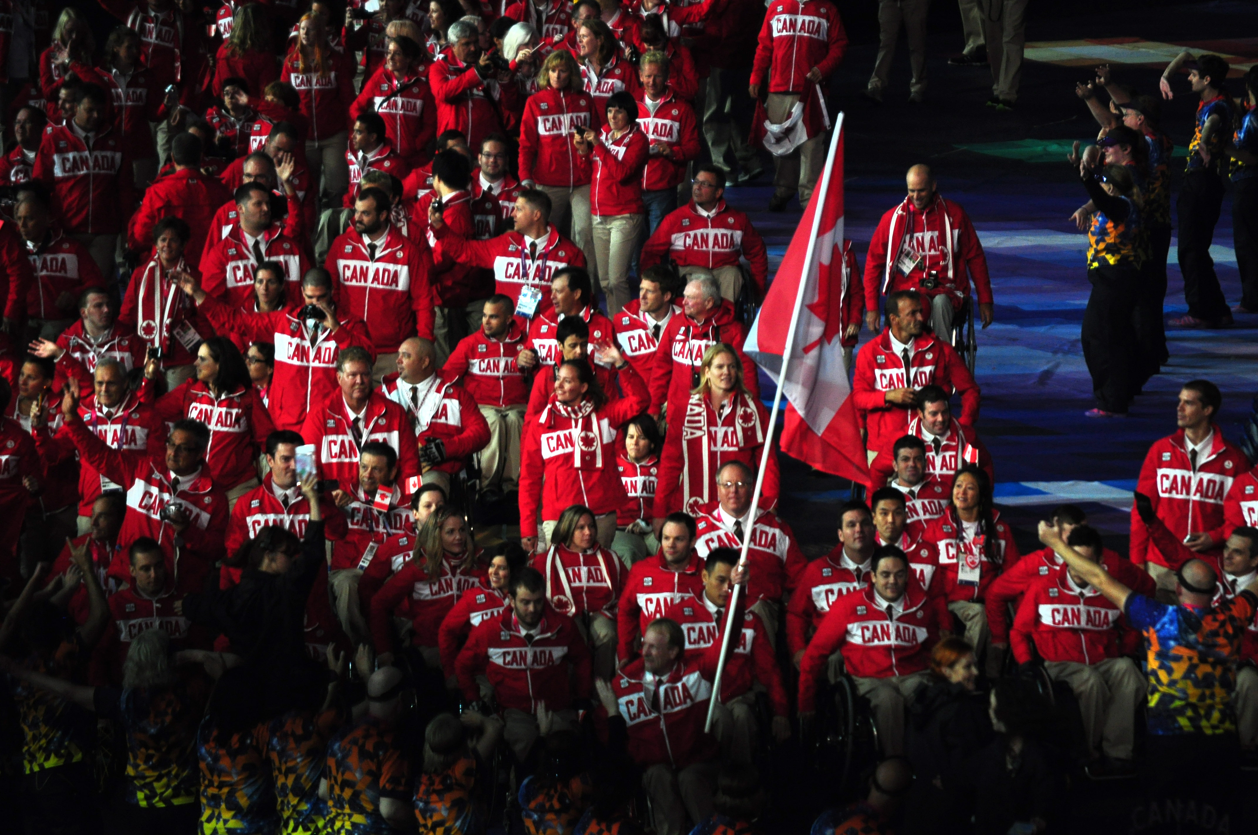 Canadian paralympians